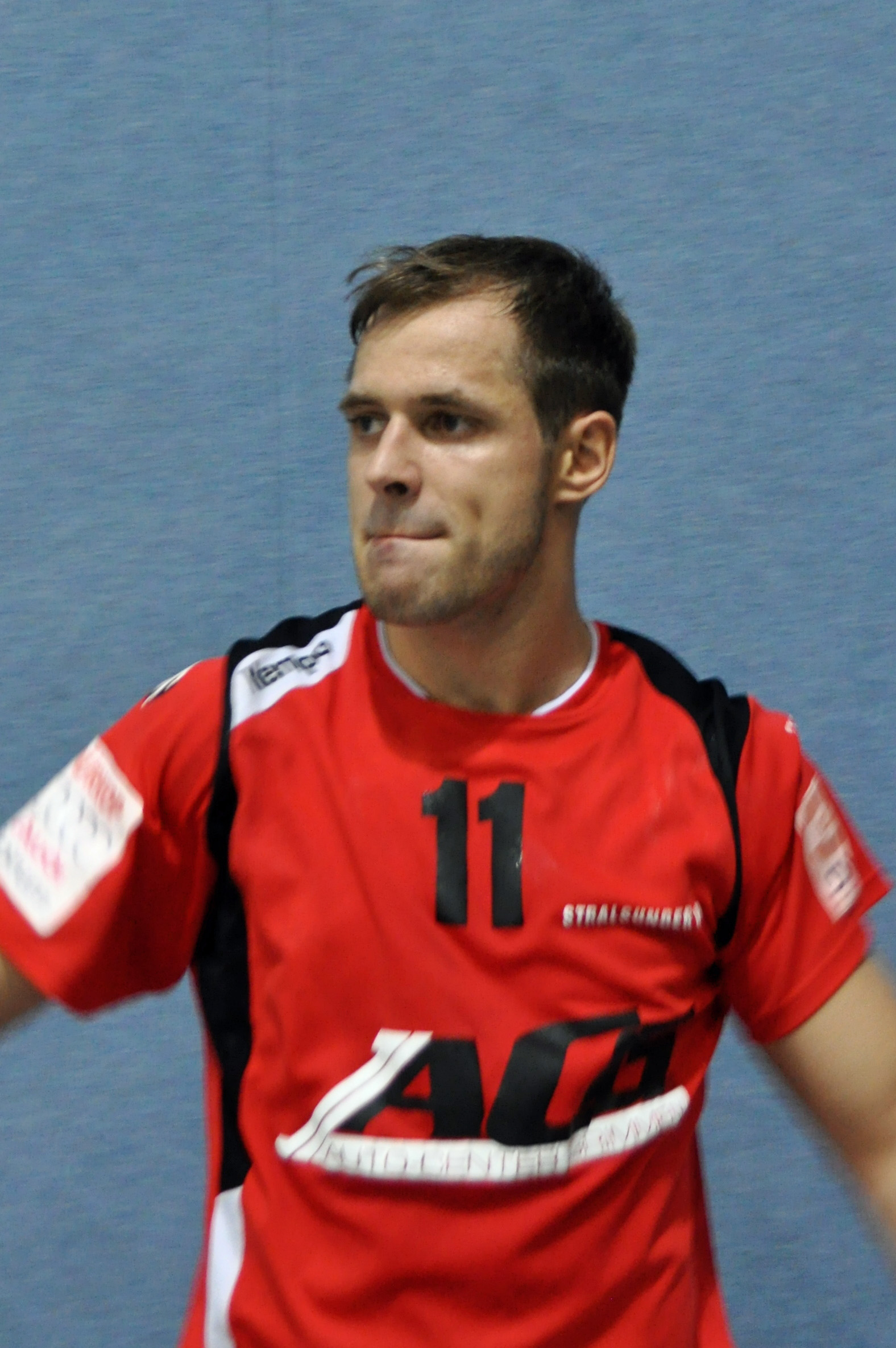 Bild aufgenommen beim Spiel in der 3. Liga (DHB) zwischen dem Stralsunder HV und dem HSV Insel Usedom am 23. März 2013 in der Stralsunder Vogelsanghalle. Das Speil endete 30:29 für den Stralsunder HV.